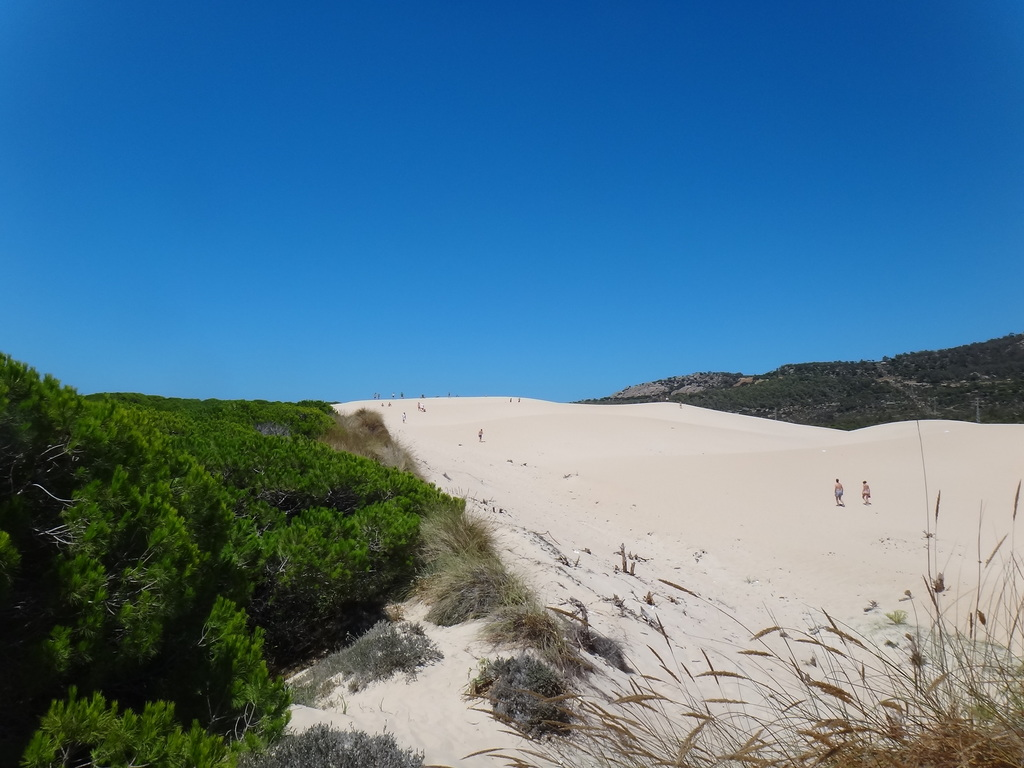 Ensenada de Bolonia